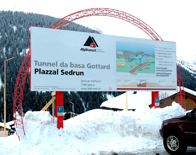 Aankondiging Gotthard-basistunnel in Serdun